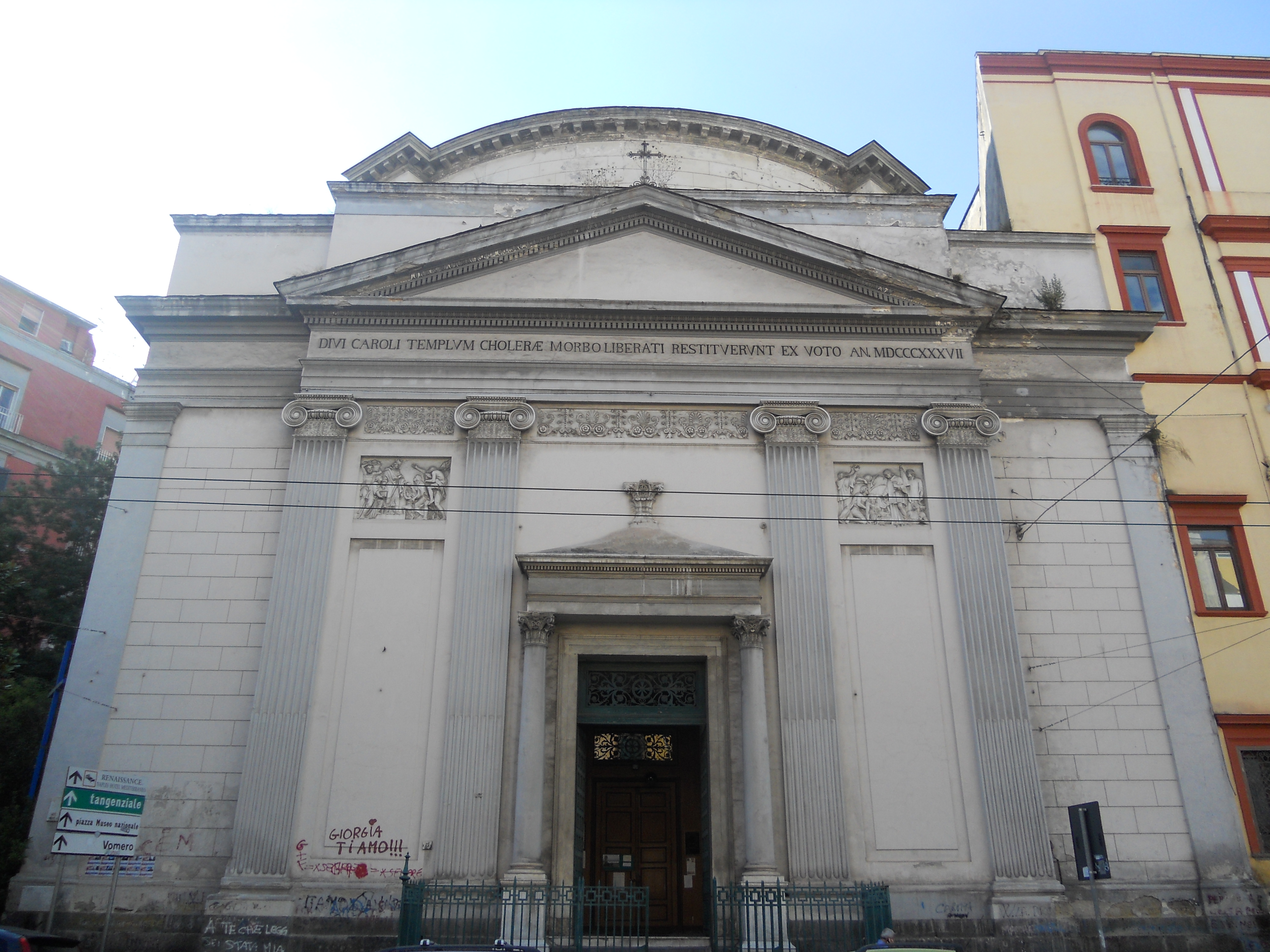 Facciata di San Carlo all'Arena, Napoli